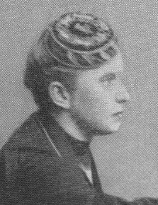 Profilporträt von Alexander von Stiegler (1857-1916)